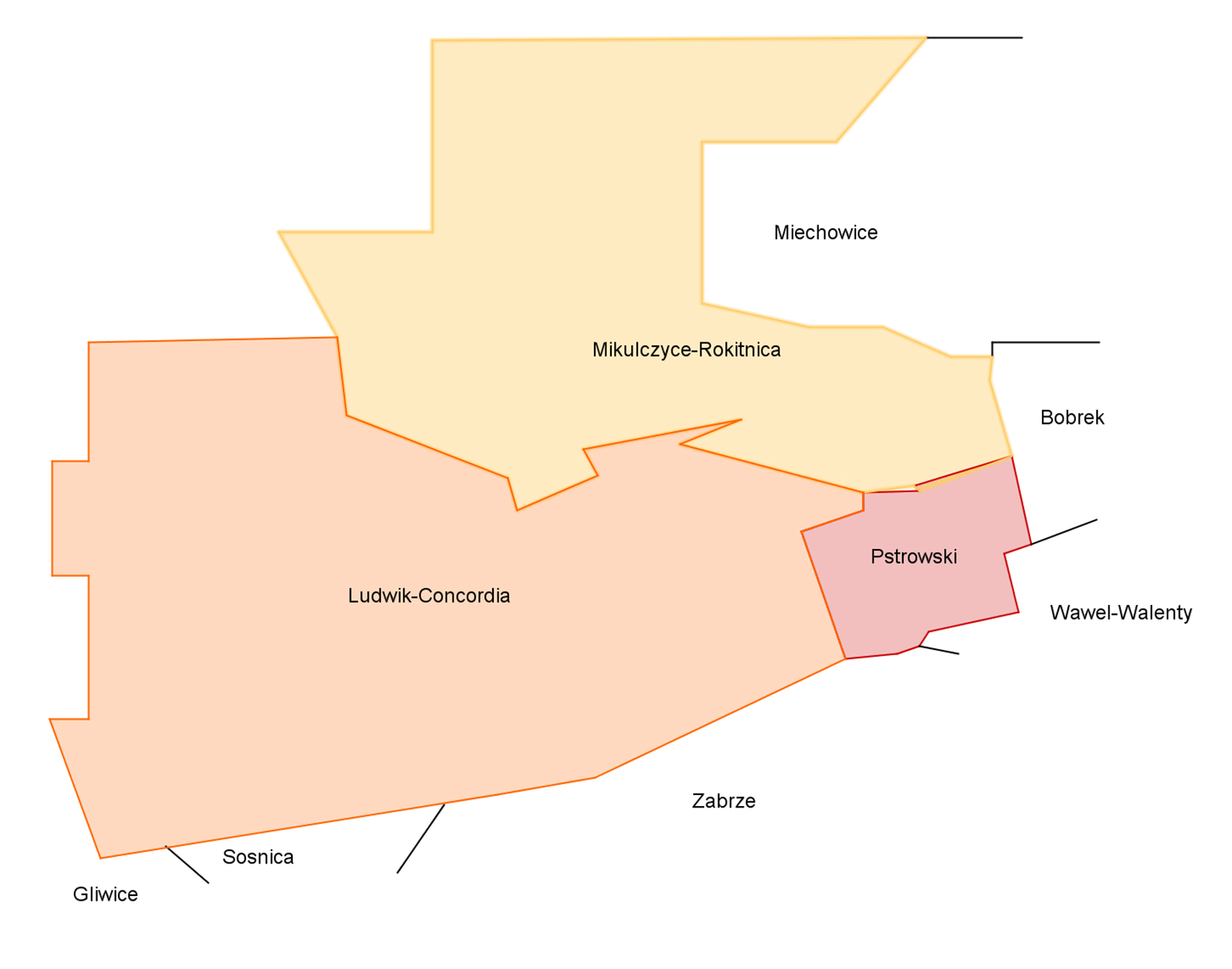 Berechtsame der Bergwerke im Norden von Zabrze Situation 1960